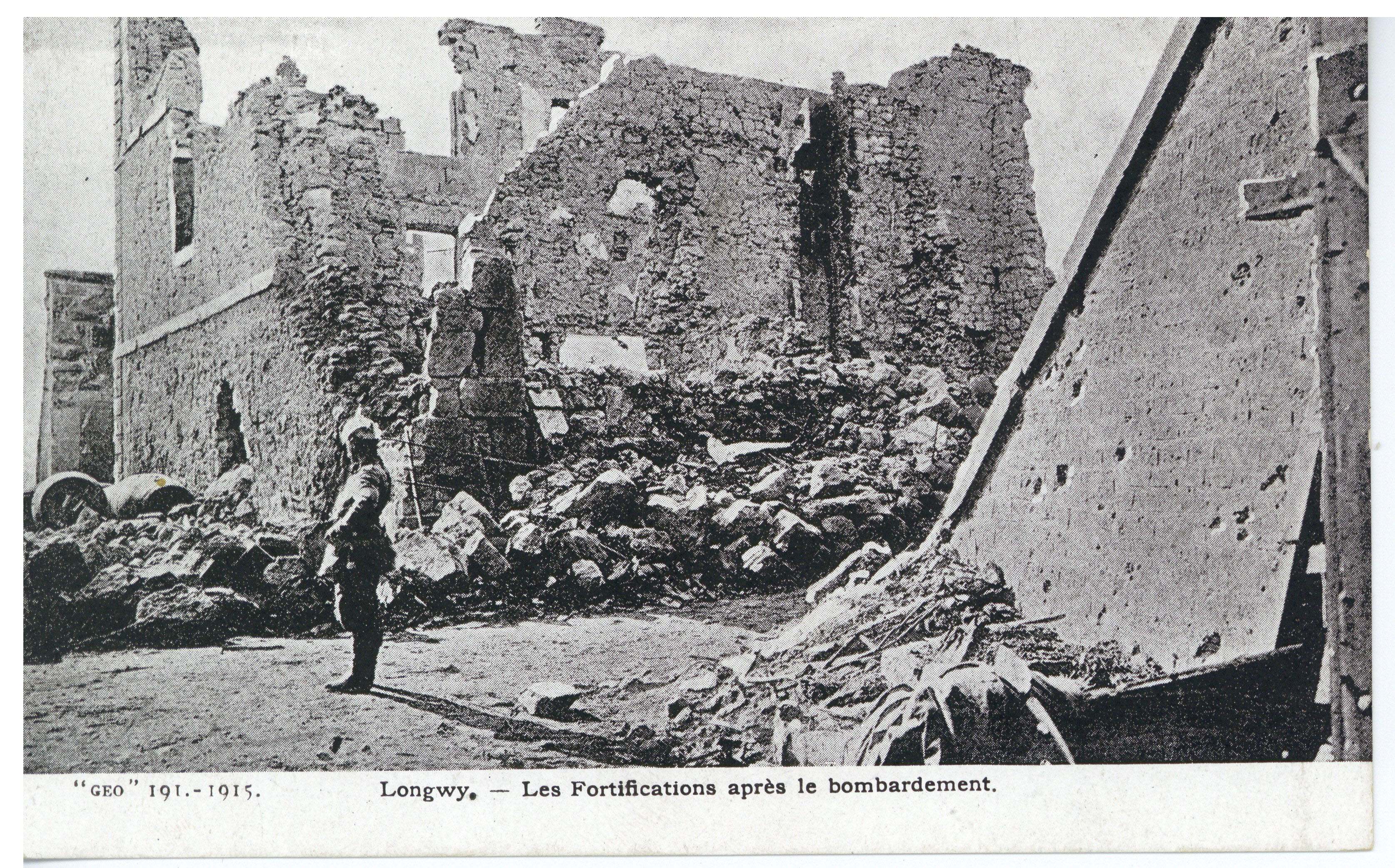 Recto : "GEO" 191.-1915